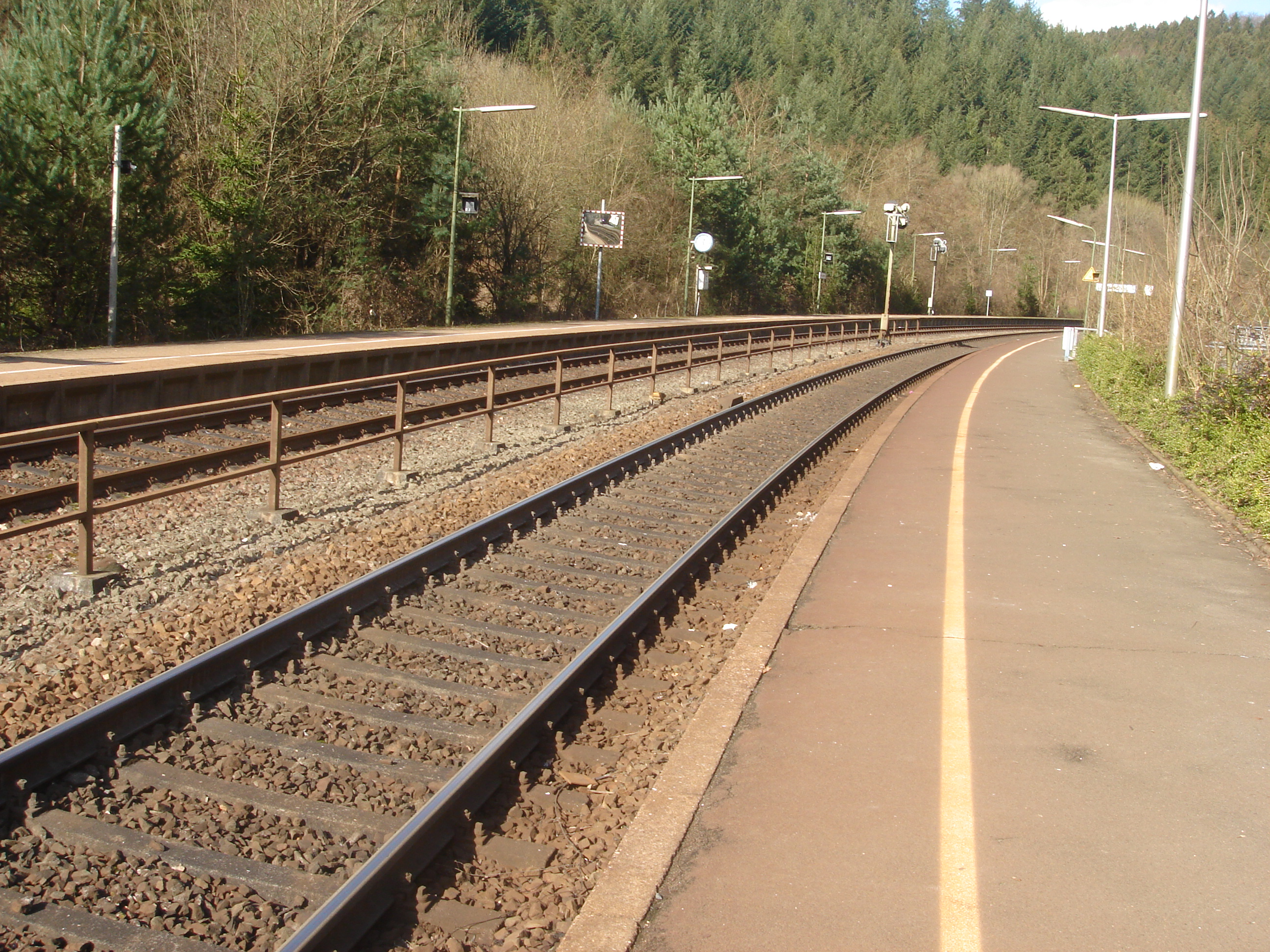 Speicher, Germany Eifelstrecke Cologne-Trier